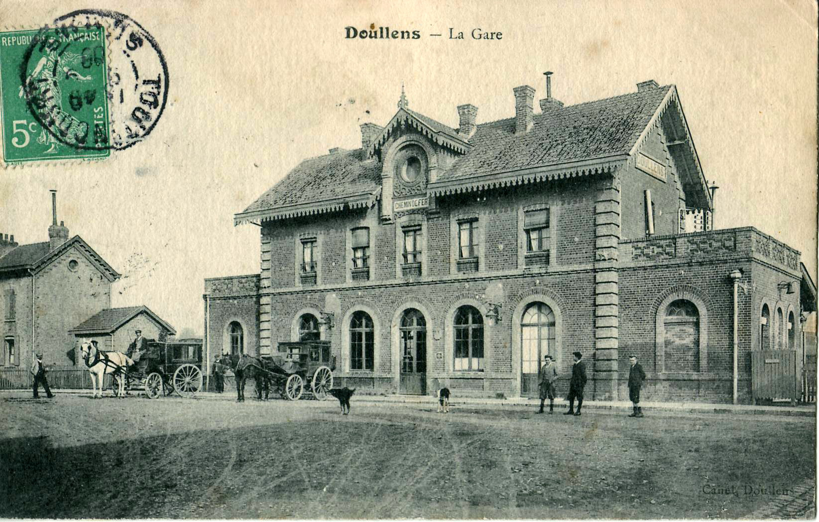 Carte postale ancienne éditée par Canet à Doullens :DOULLENS - La Gare